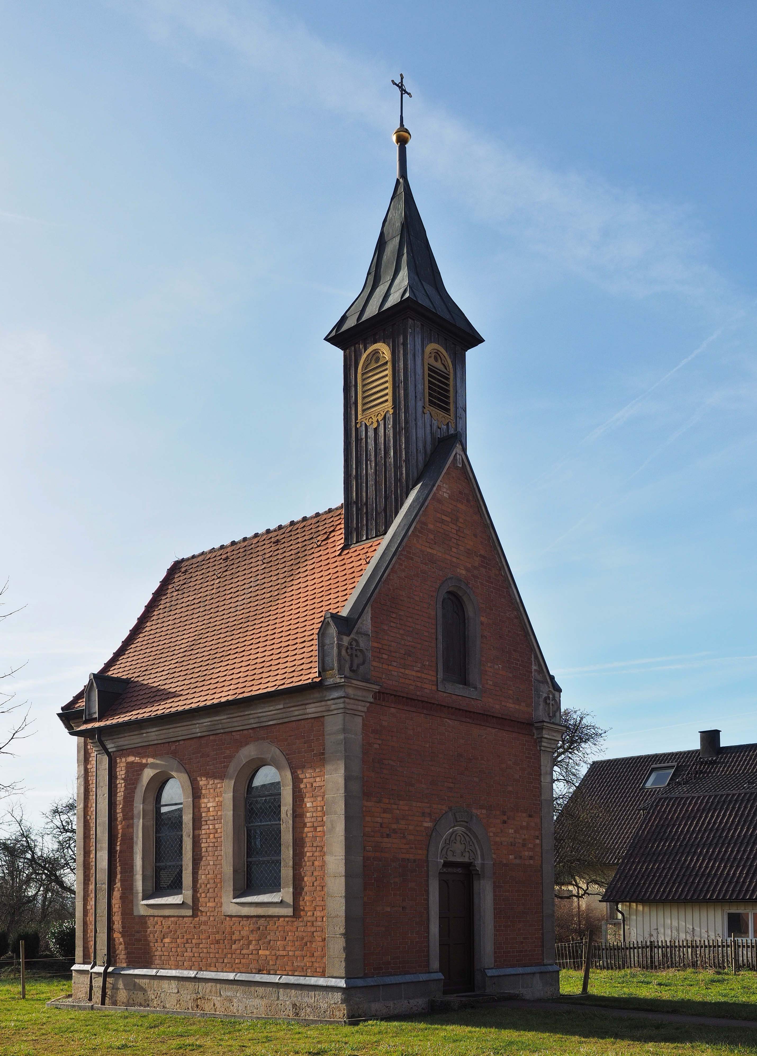 Blick von Nordost auf die Marienkapelle Immenhofen